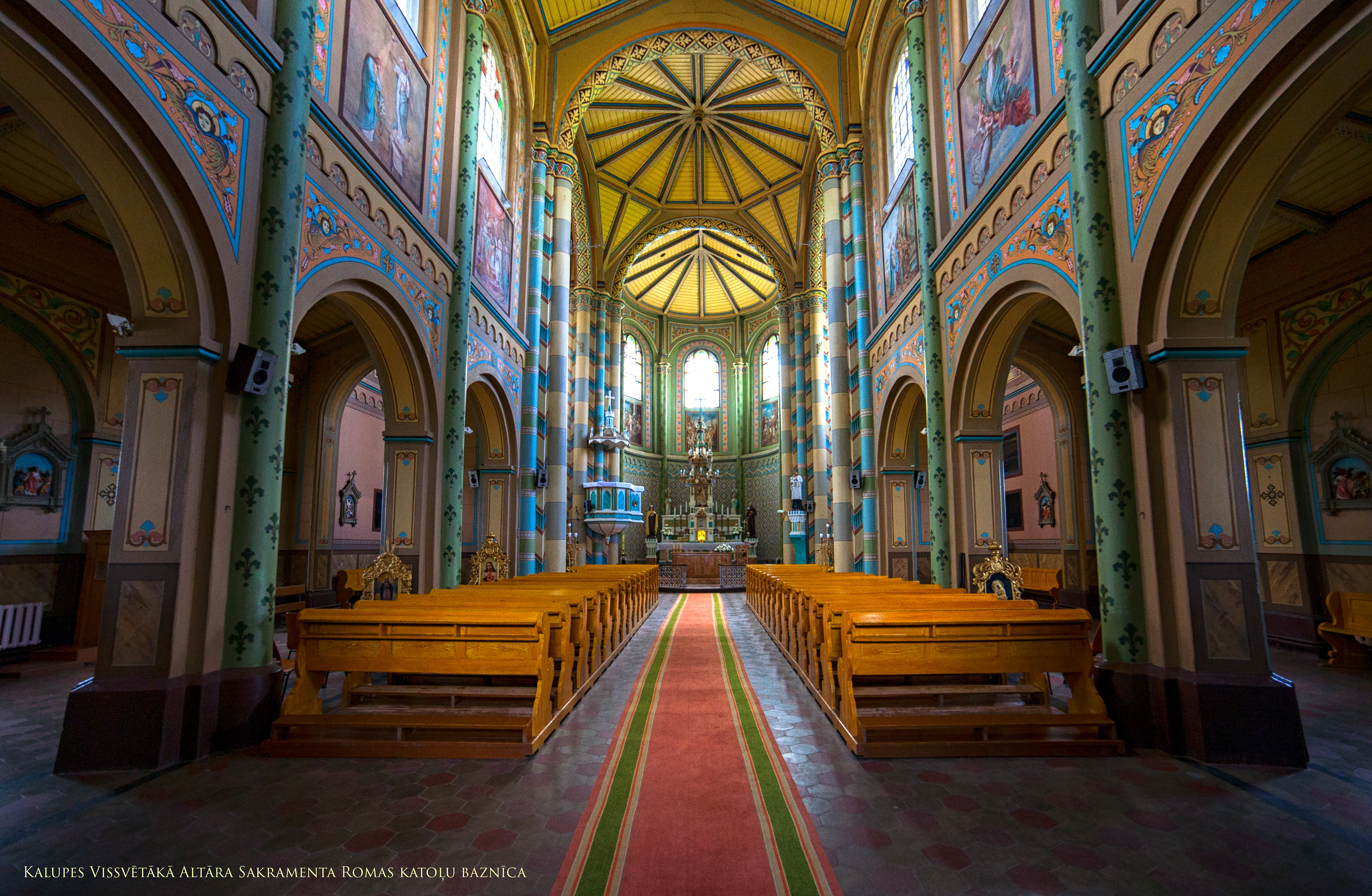 Interjera dekoratīvā apdare un iekārta, Kalupes pagasts